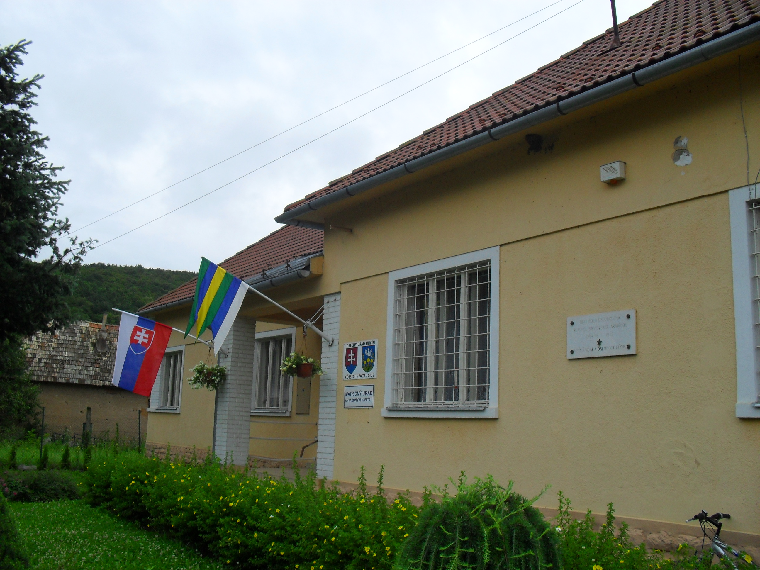 Gice - községi hivatal